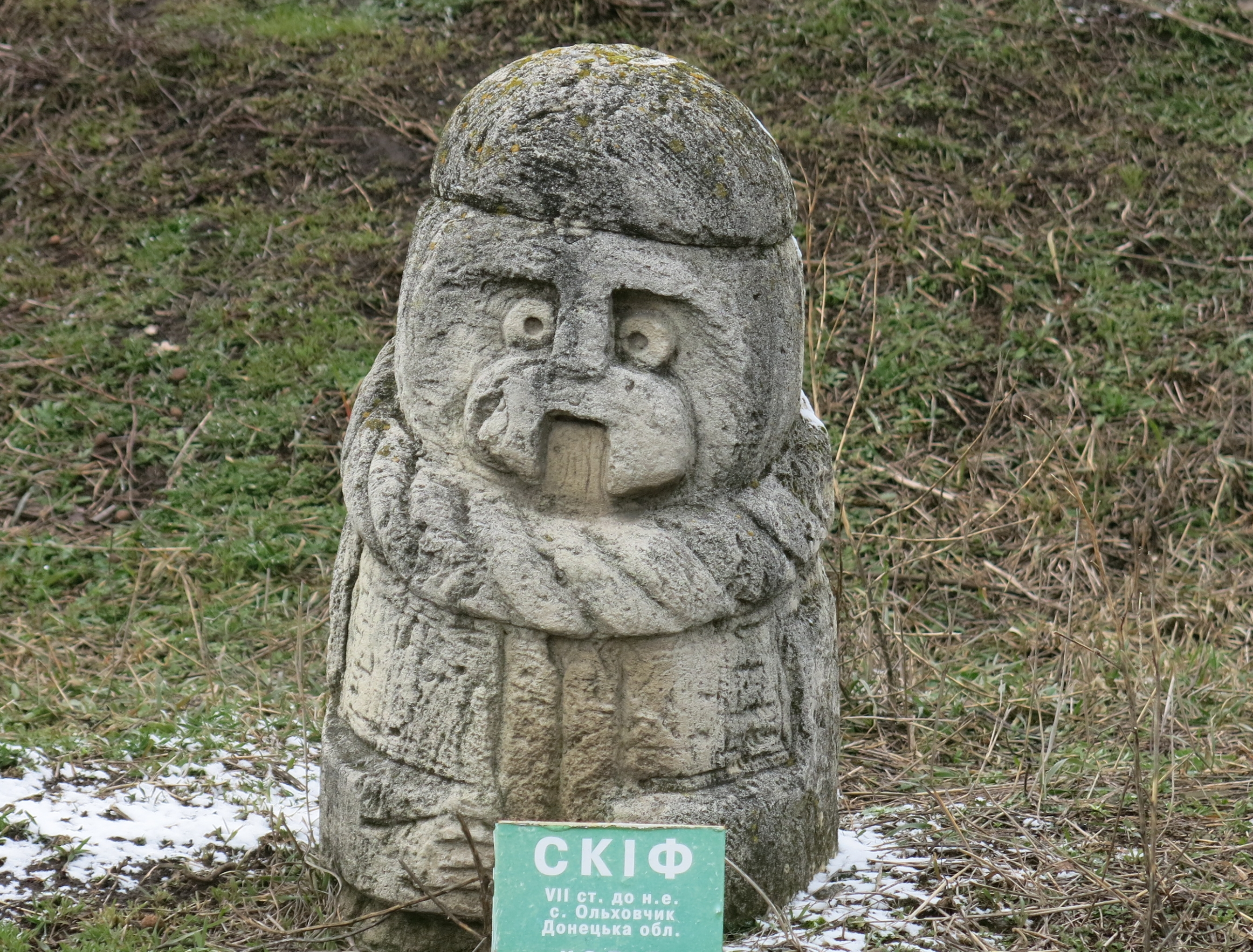 Національний заповідник «Хортиця», Запоріжжя, о. Хортиця